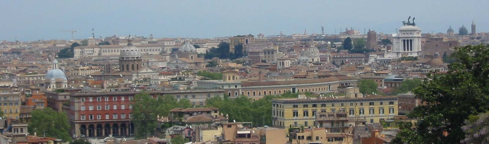 Rome panorama